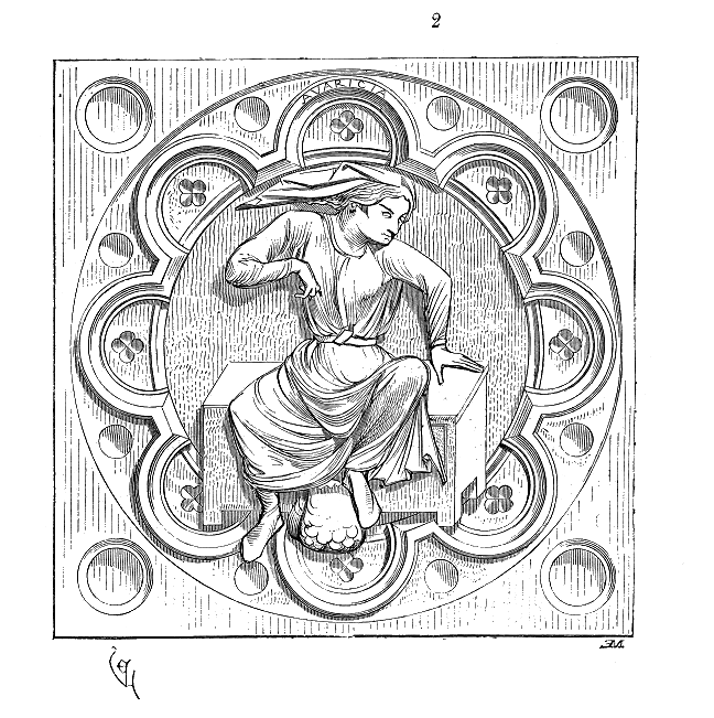 ... L'Avarice (fig. 2) est une des belles sculptures de cette époque (1170 environ). Les cheveux épars sous un lambeau d'étoffe, la main gauche crispée, crochue, elle est assise sur un coffre qu'elle a fermé violemment de la main droite; sous ses pieds sont des sacs pleins d'écus. L'Avarice est ici personnifiée ...